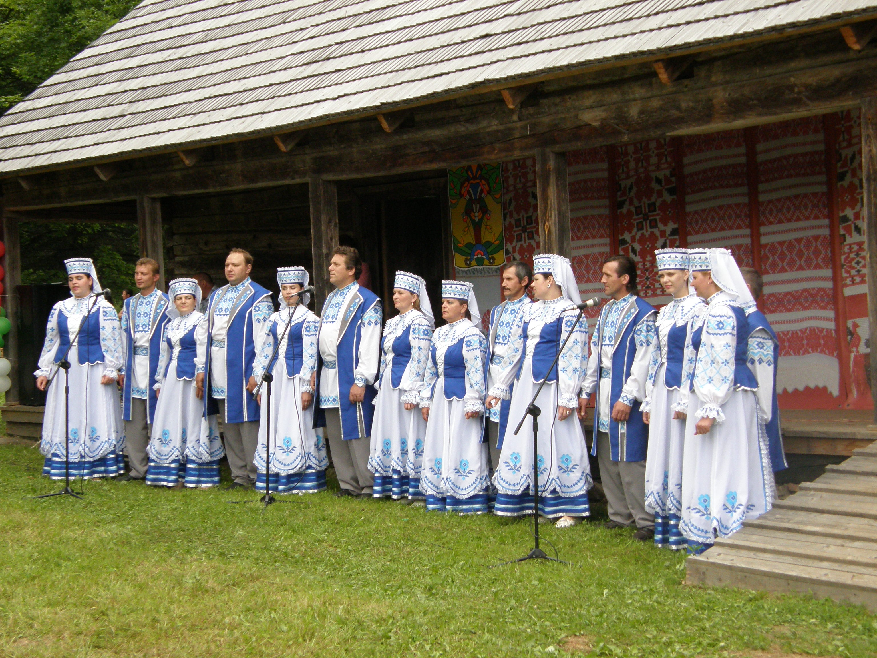 Свята ў Вязынцы